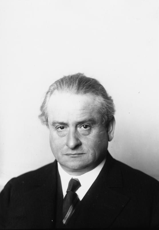 10560. Ein Schilderer Mexikos. Prof. Goldschmidt: Auf den Spuren der Azteken. Der enthusiastische Mexikoschilderer Prof. Alfons Goldschmidt hat als wissenschaftlicher Leiter mit der Ufa einen Expeditionsfilm für dieses politisch und wirtschaftlich hoch bedeutsame Land herausgebracht, um ihm neue Freunde zu verschaffen.